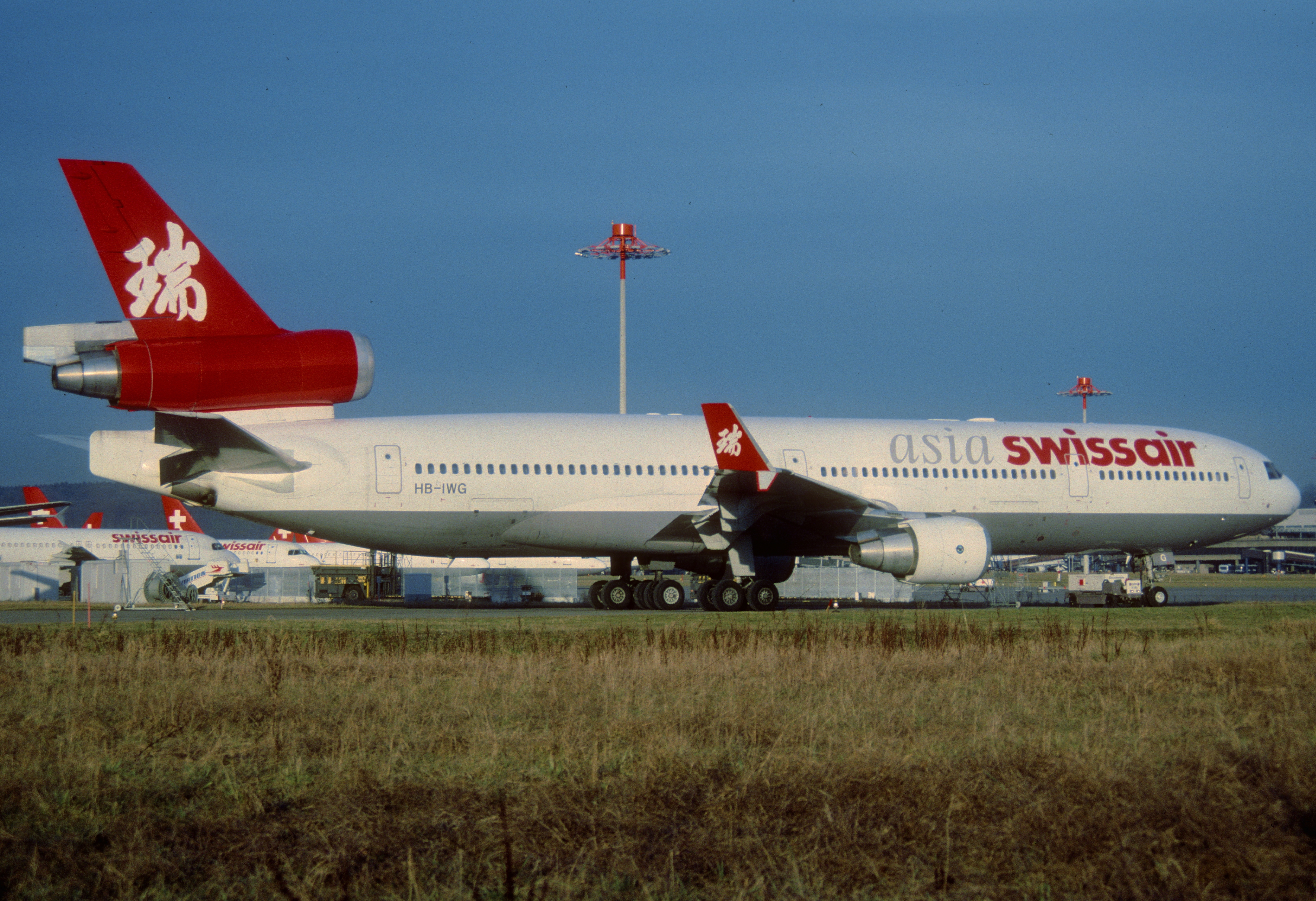 163aq - Swissair Asia MD-11; HB-IWG@ZRH;30.01.2002